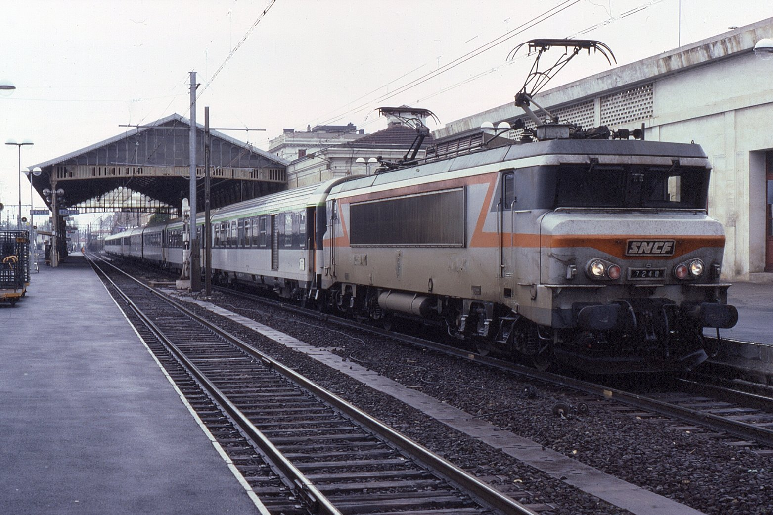 BB7240 is seen at Béziers on 9 April 1987.